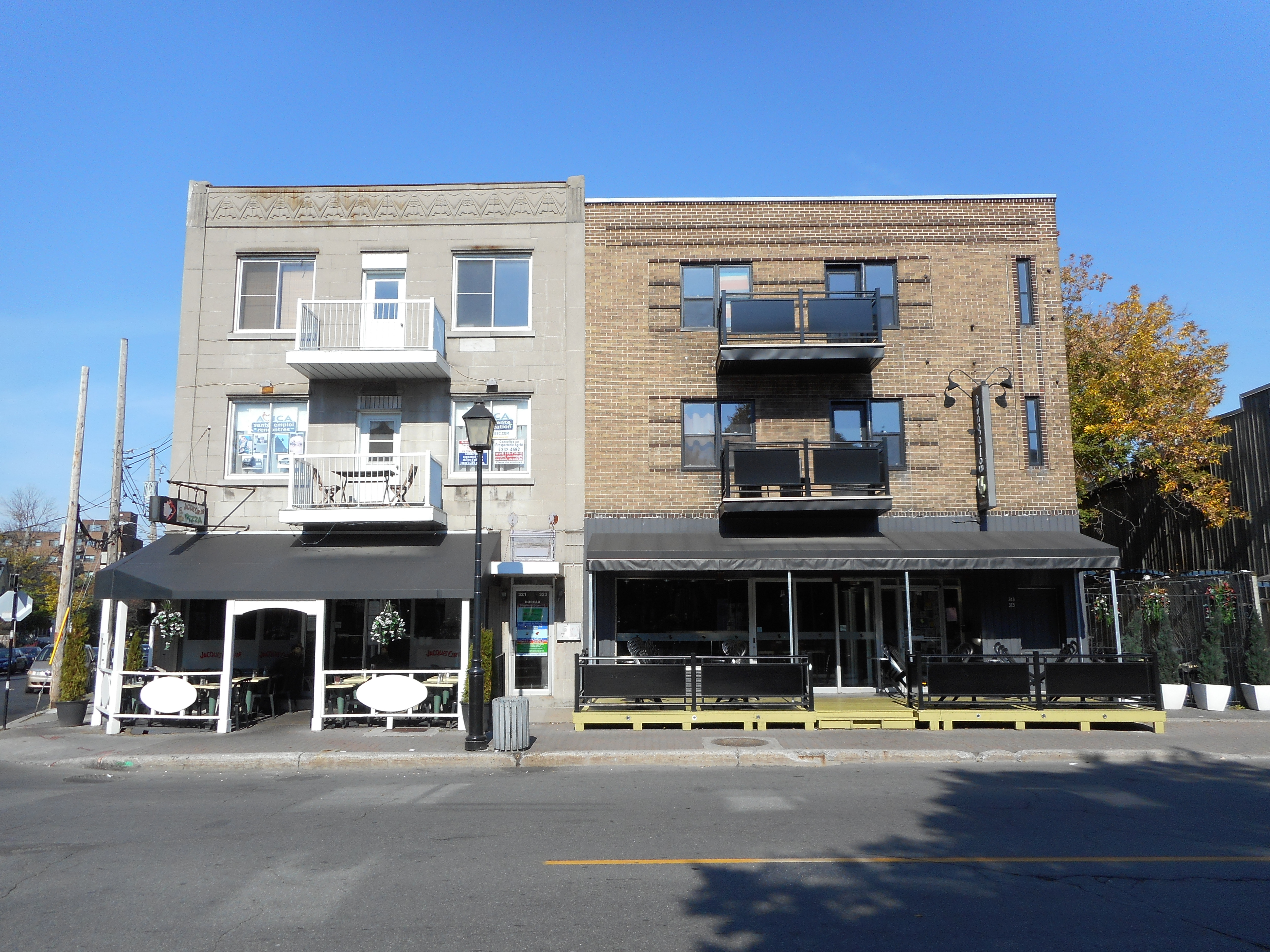 À droite : 311-315, rue Saint-Charles Ouest marigot.ca